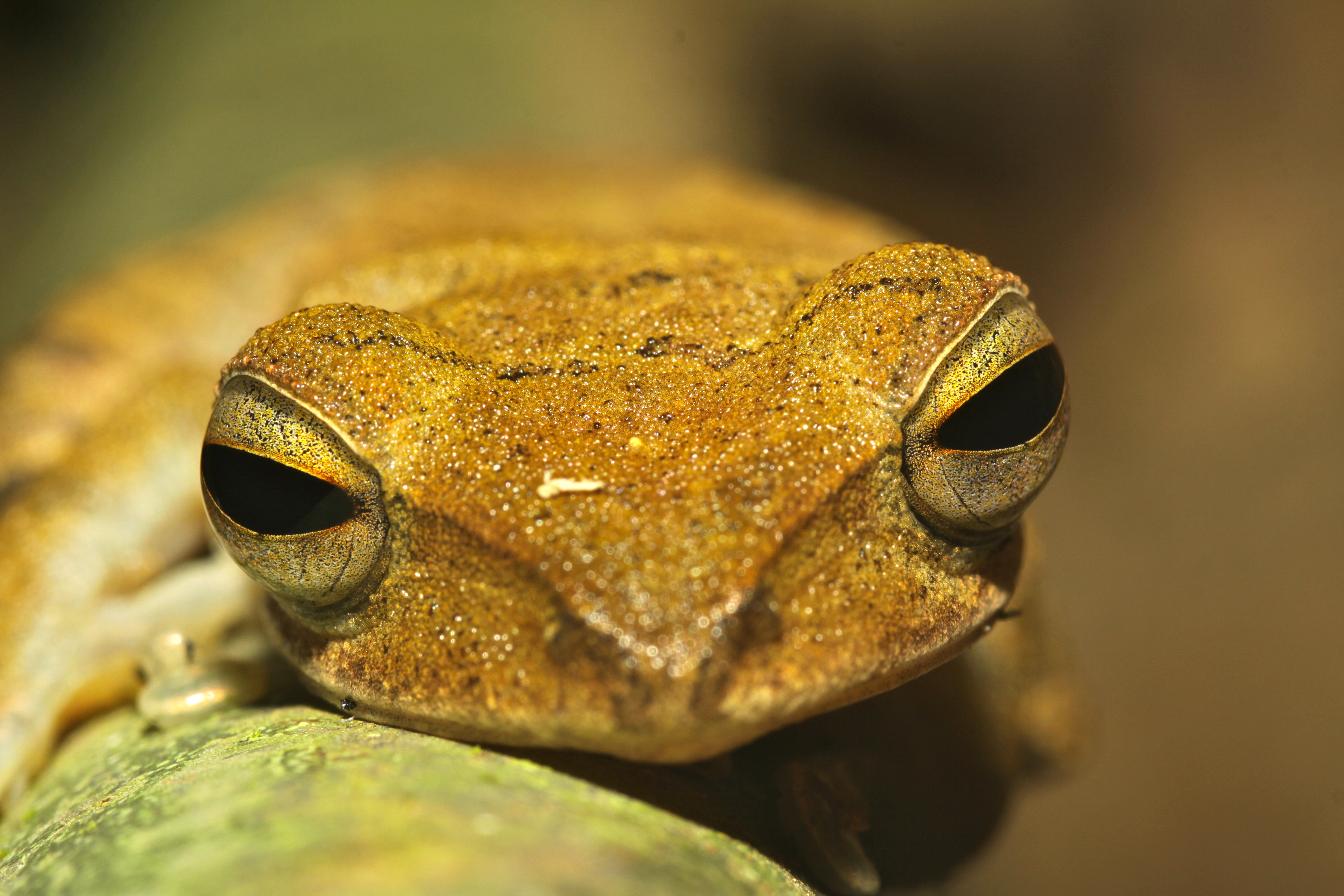 Taman Negara NP, Pahang, MALAYSIA